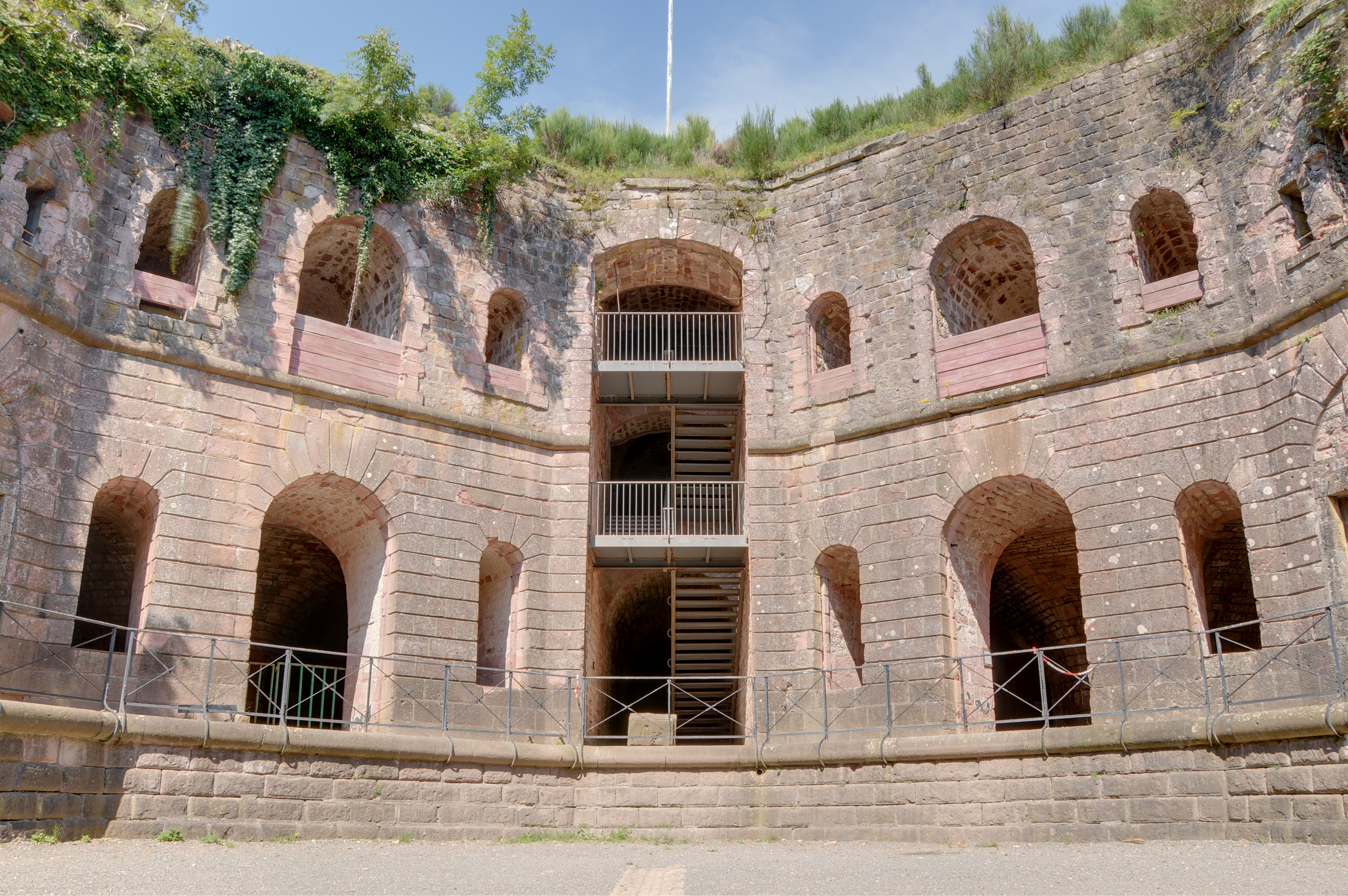 La cour intérieure (HDR).